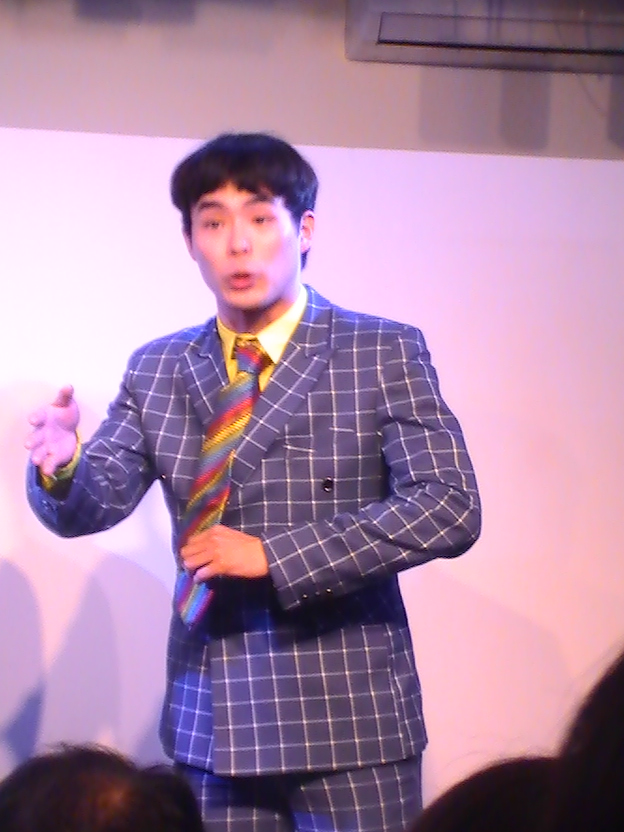 サツマカワRPG (2017年5月21日)